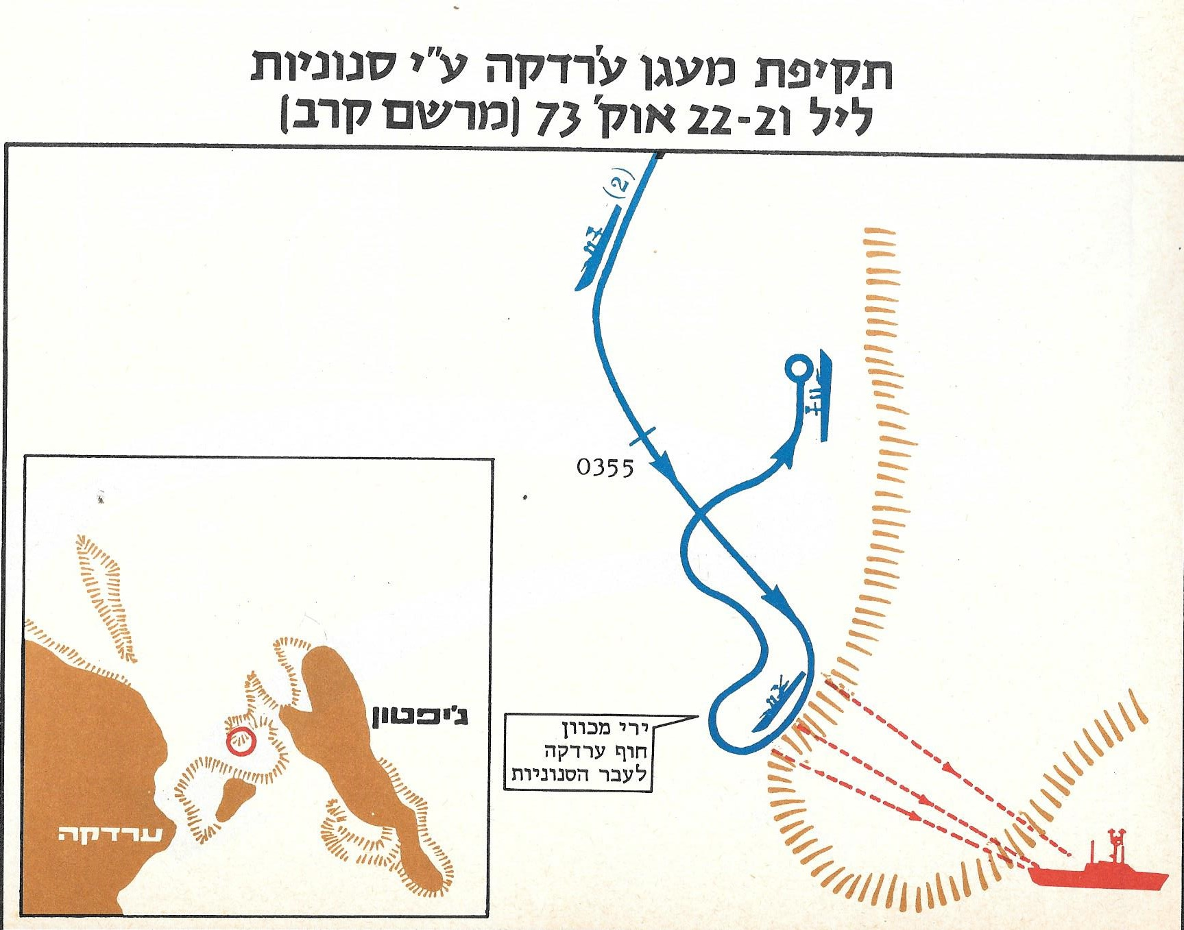 תרשים מפגש וירי רקטות נ"ט מגבית 16